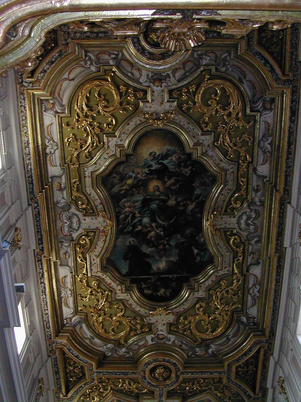 l'Aquila Basilica di San Bernardino